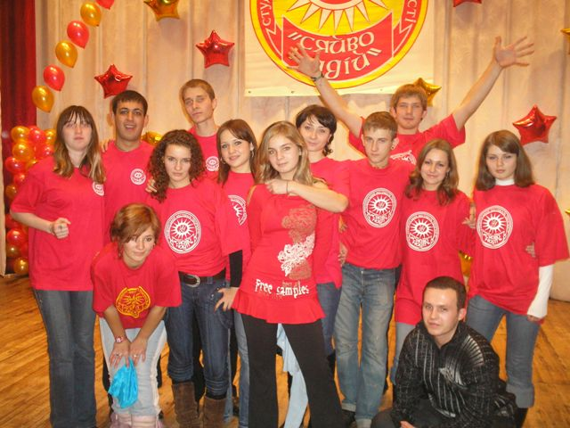 "Сяйво надій" 2006: "Сяйво надій" — перший і єдиний фестиваль, що проводиться з метою соціальної адаптації та інтеграції в суспільство студентської молоді з особливими потребами, розкриття та розвитку її творчого потенціалу.